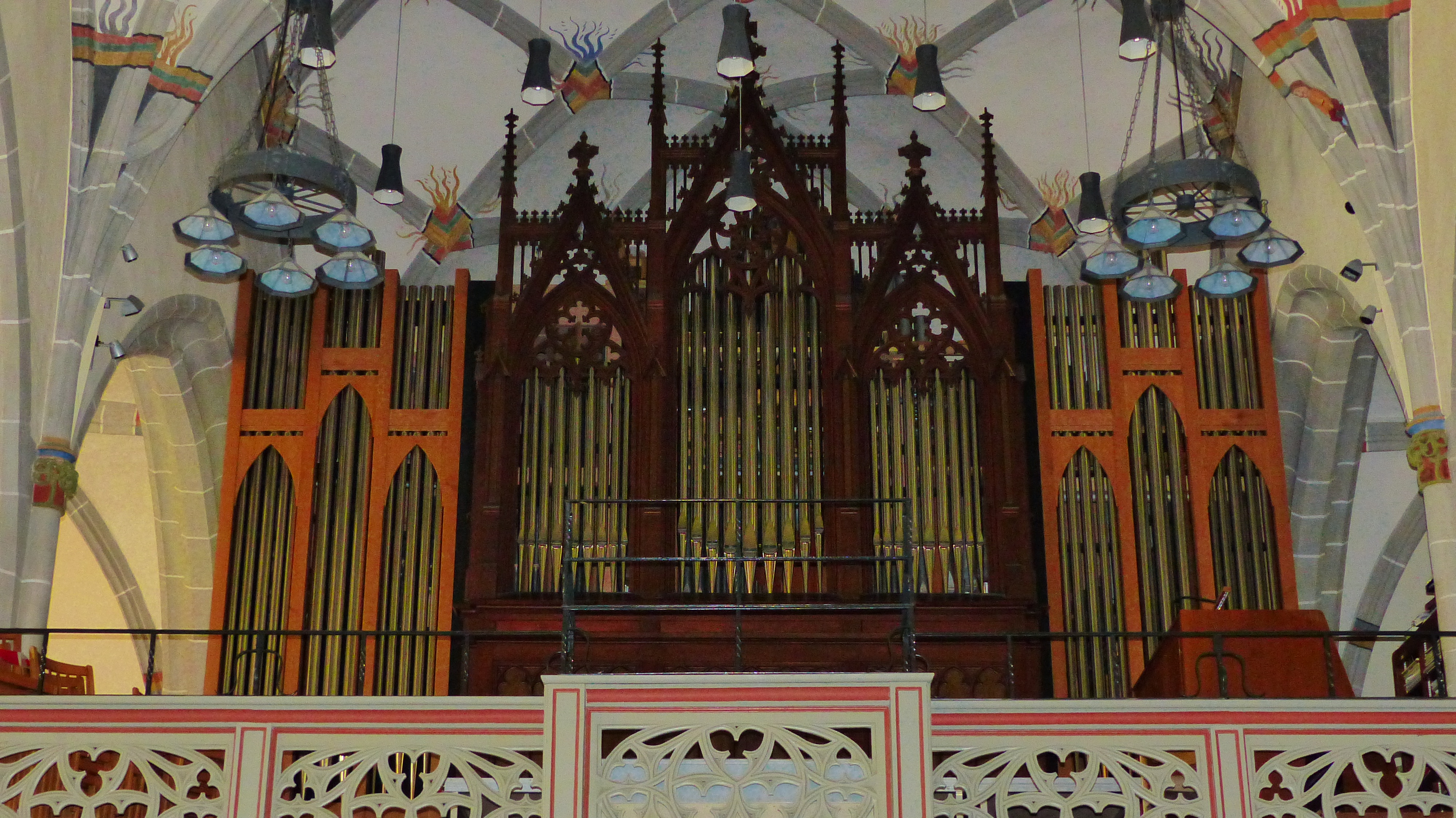 Michaelskirche, Waiblingen